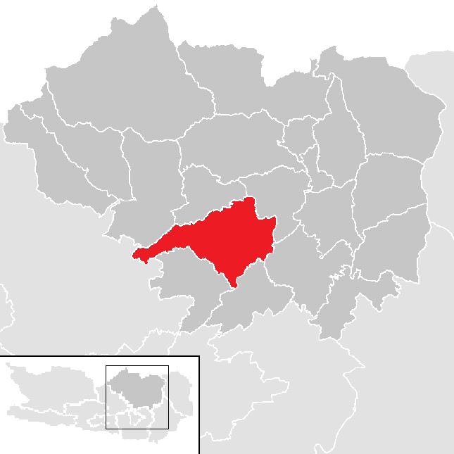 Bezirk Sankt Veit an der Glan